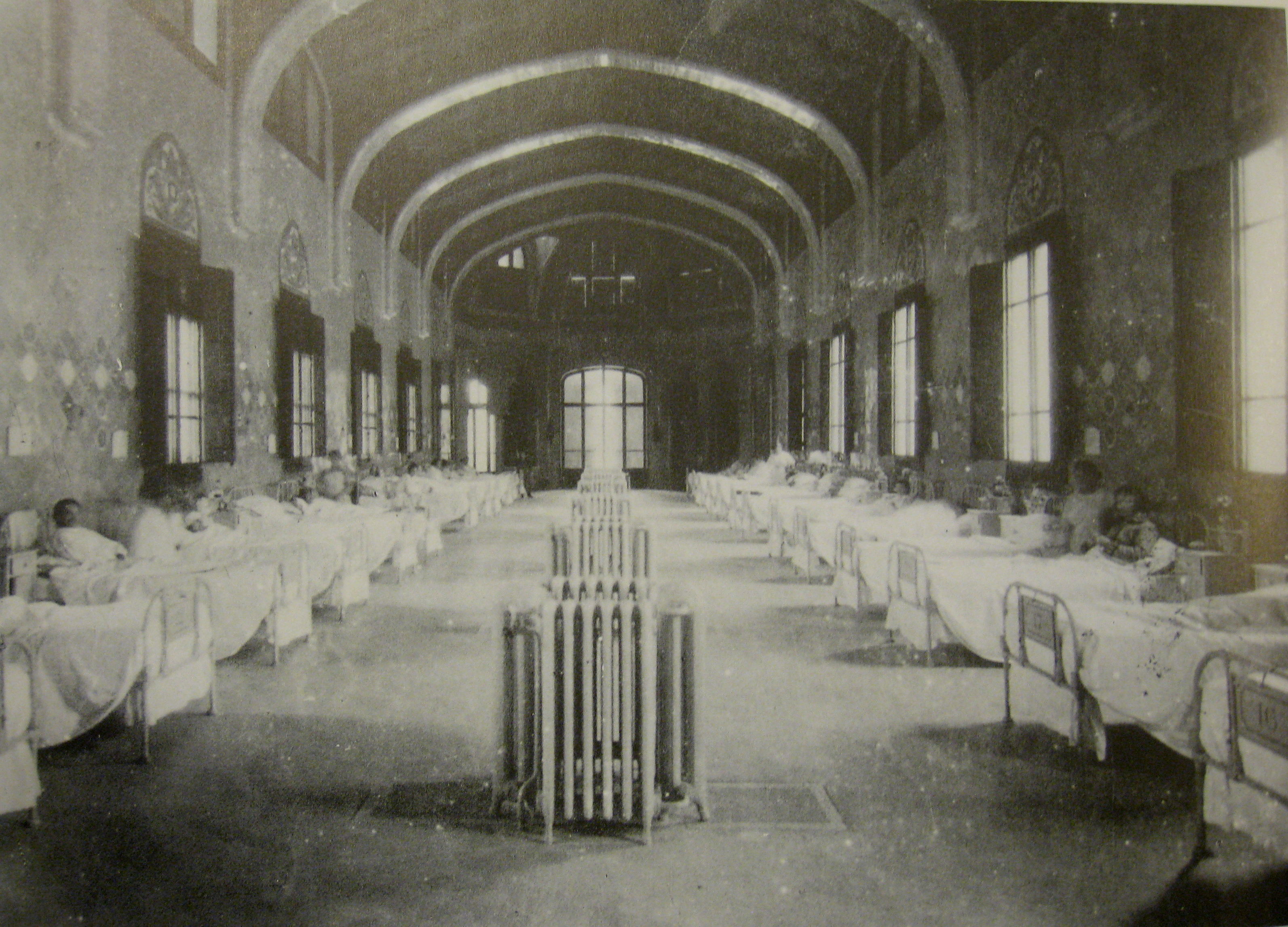 Sala de l'hospital de Sant Pau de Barcelona (Catalunya) a poc de la seva inauguració.